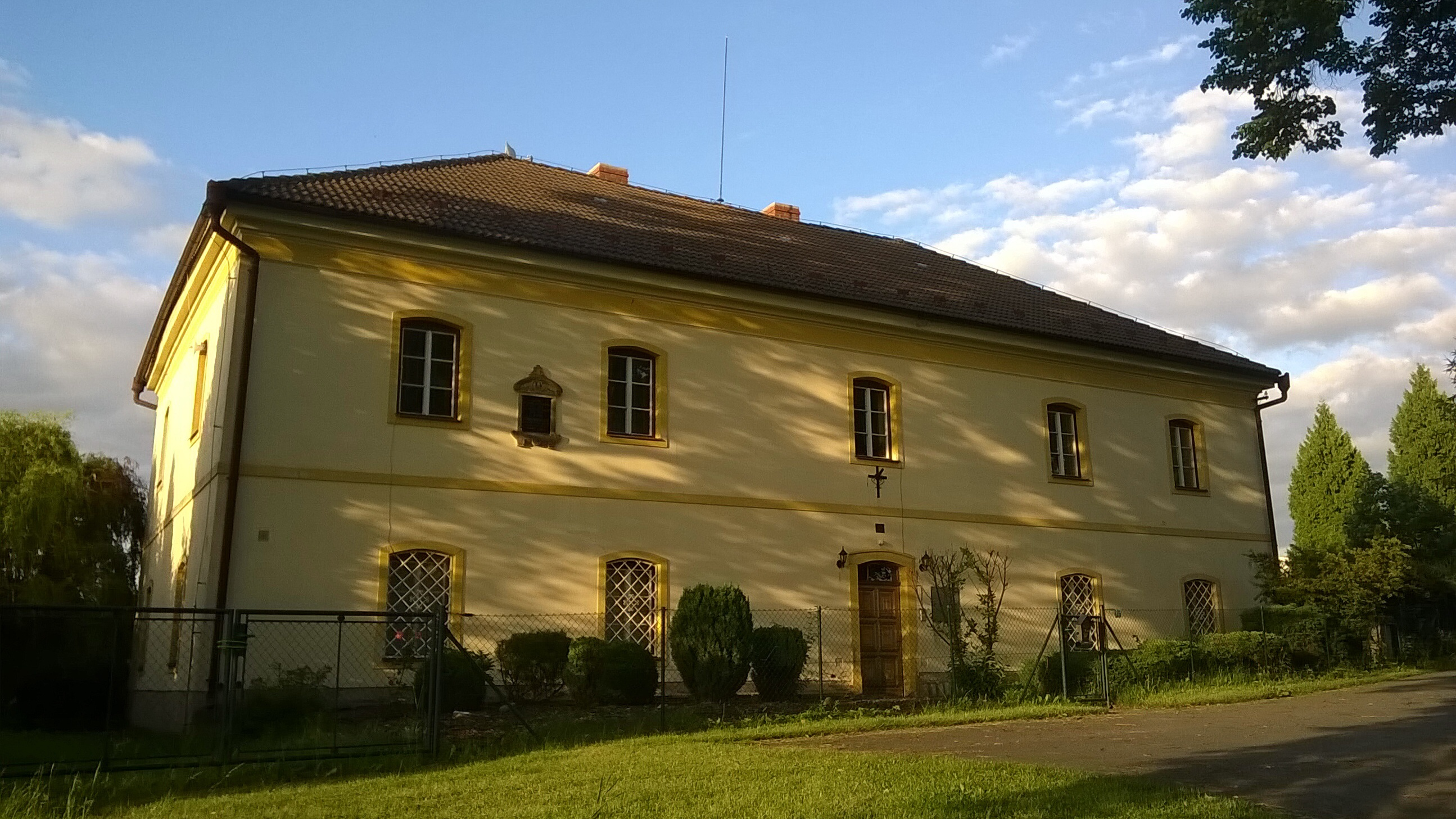 Fara, Solnice 203, Solnice (okres Rychnov nad Kněžnou).